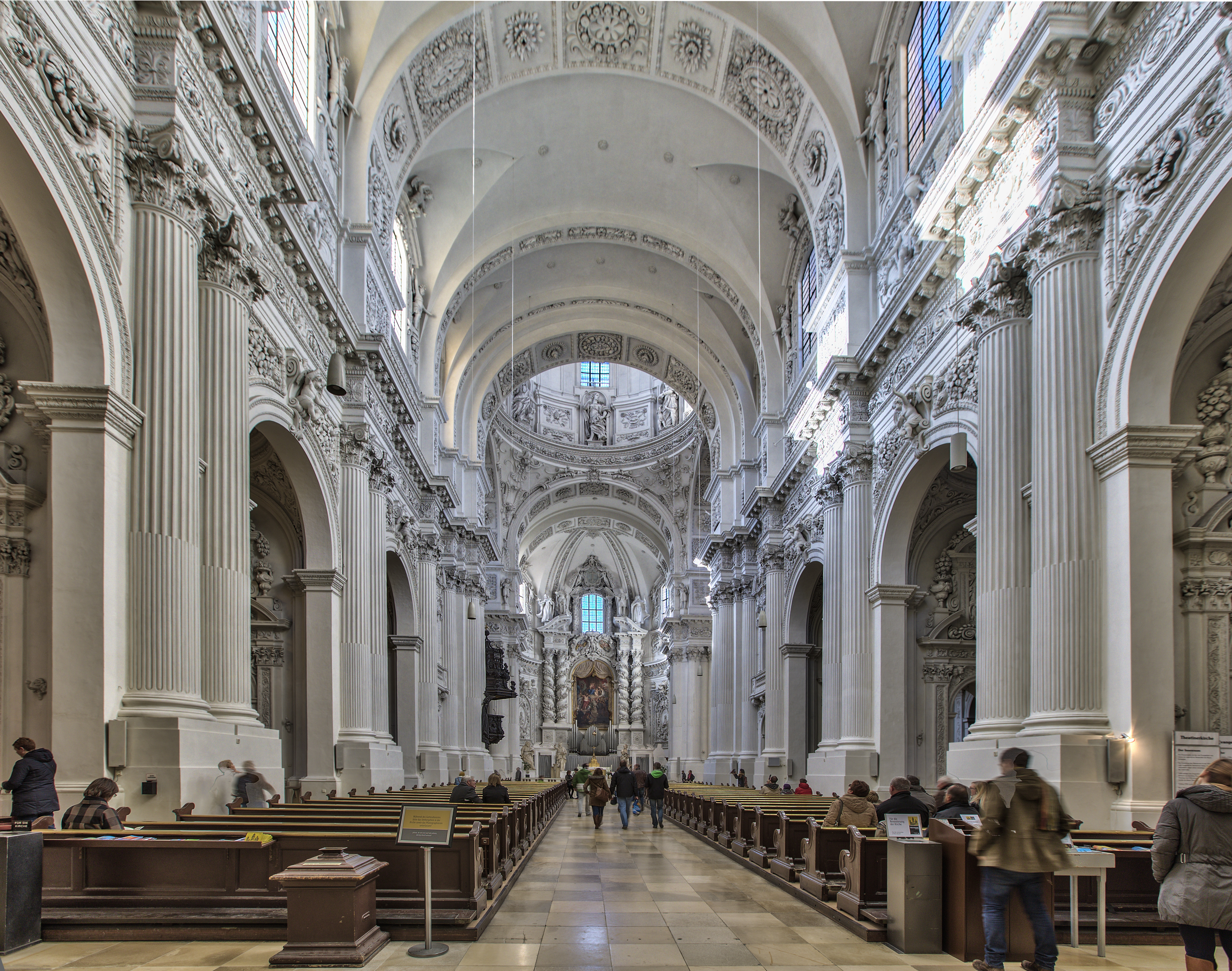 Hauptschiff der Theatinerkirche SpätbarockThis is a photograph of an architectural monument.